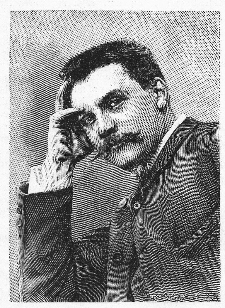 Albert Edelfelt (1854-1905)